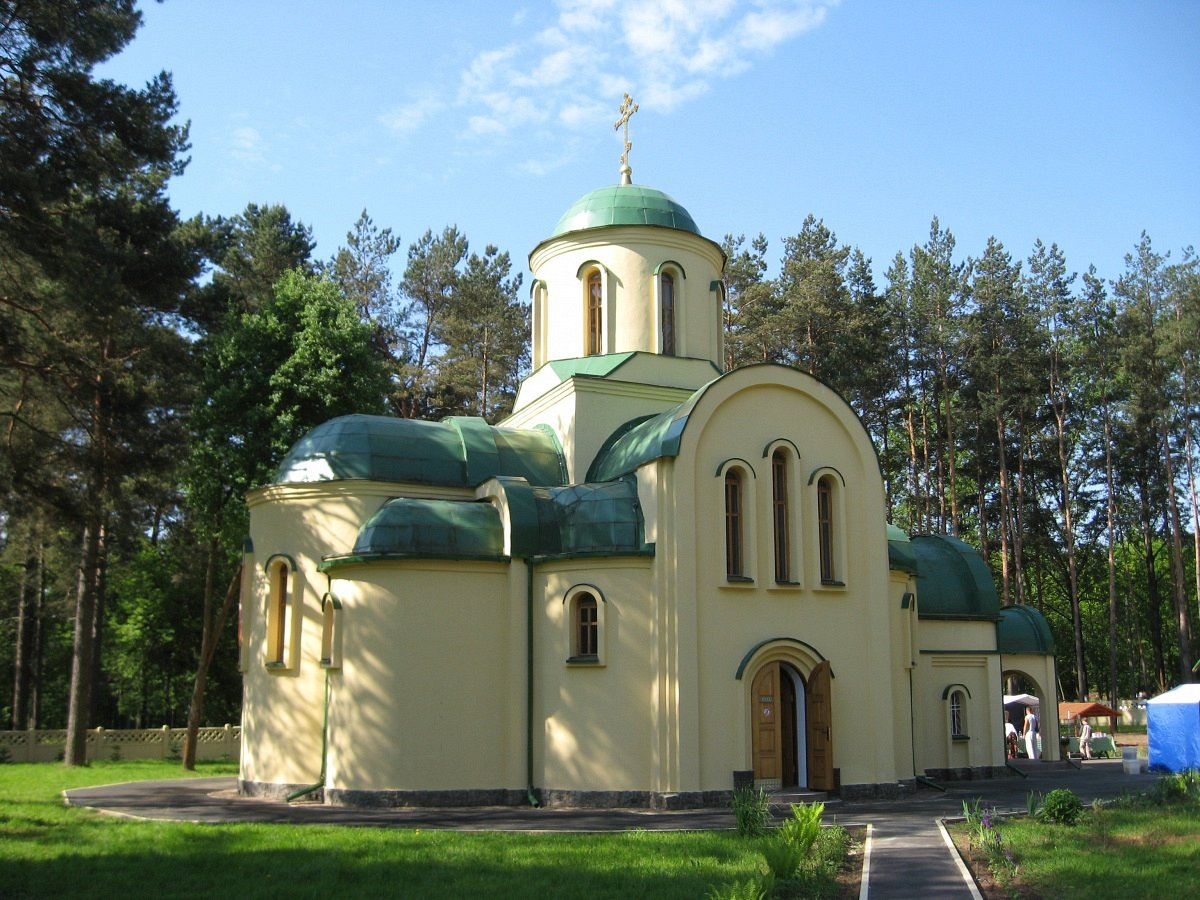 Барысаў. Царква Дзмітрыя Данскога на ўездзе ў горад